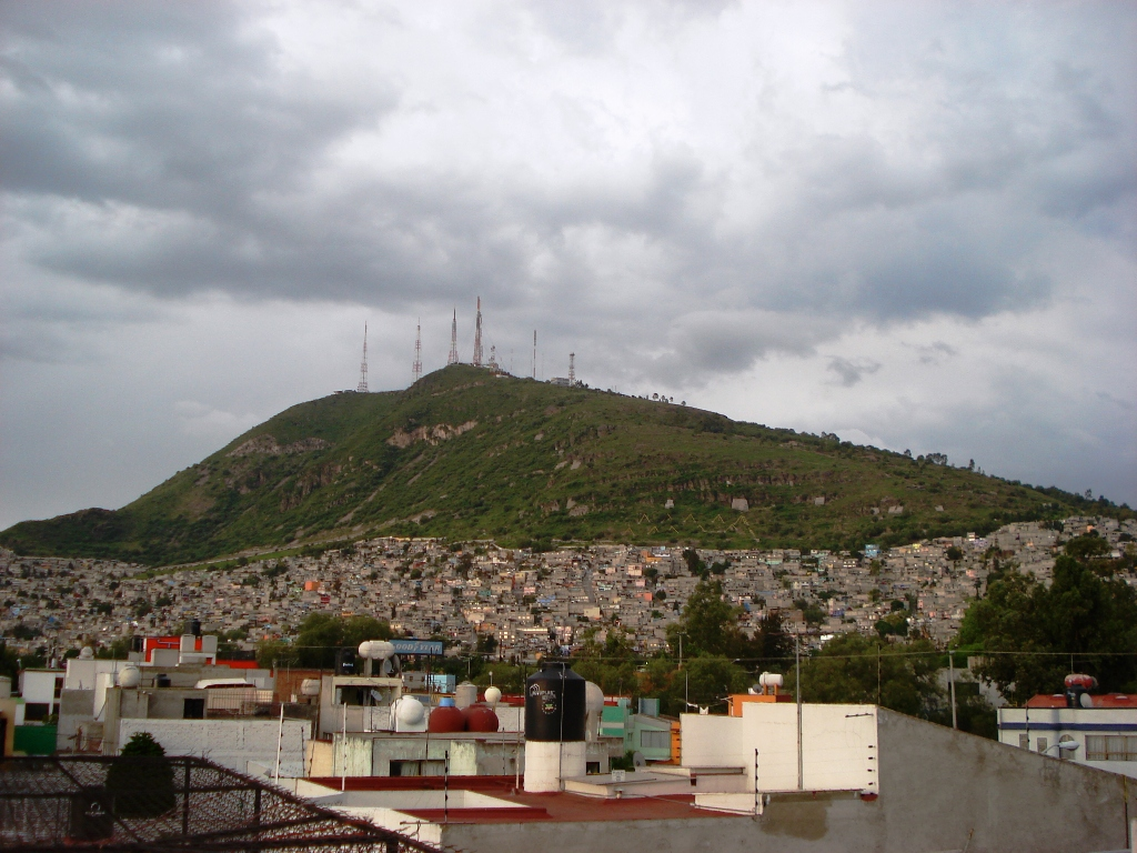 Panorama del Cerro del Chiquihuite en una tarde nublada en la Ciudad de México.